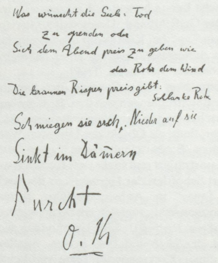 Otfried Krzyzanowski Was wünscht die Seele